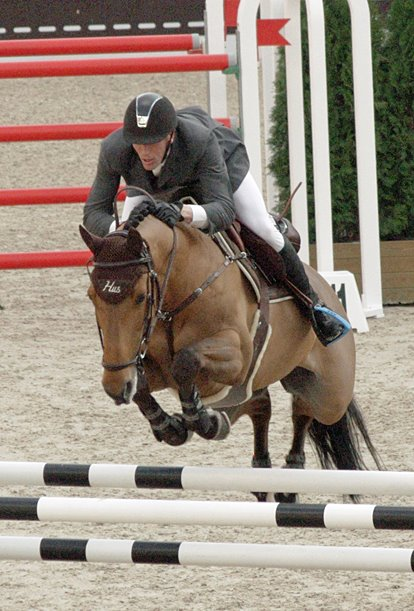 Kevin Staut et Le Prestige St-Lois*de Hus, lors de l'édition 2012 du Saut Hermès à Paris.